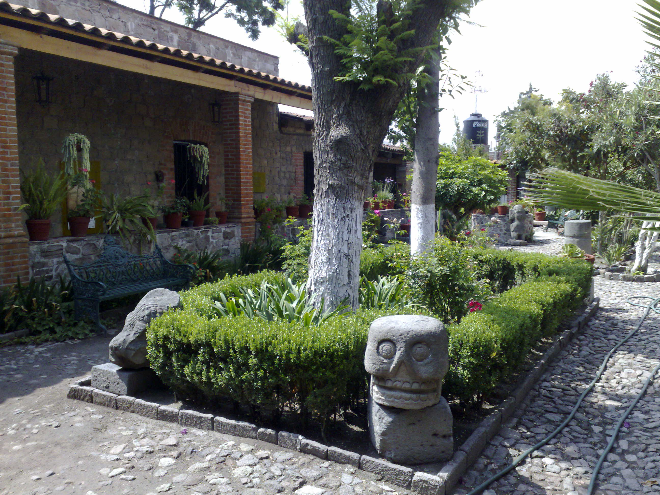 Patio del museo de sitio de Santa Cecilia Acatitlán